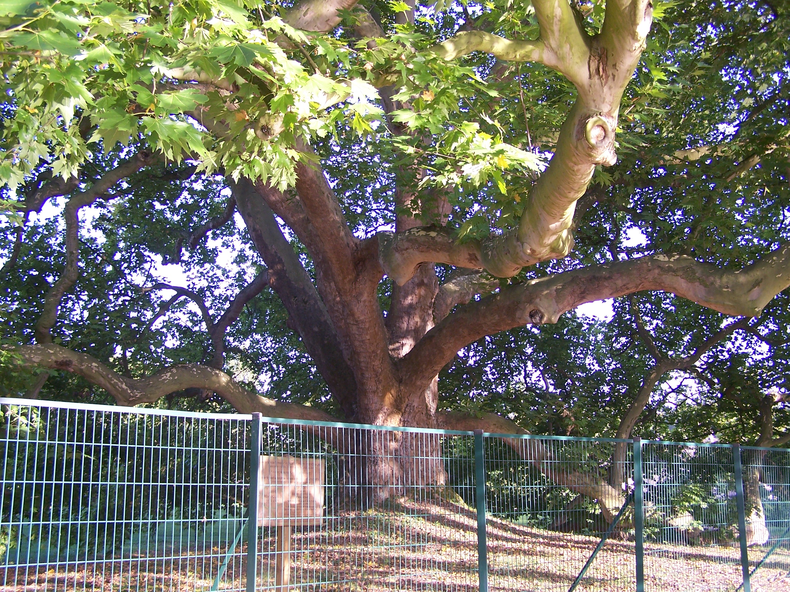 Arbre de Diane aux Clayes-sous-Bois (Yvelines, France). Photo personnelle Arbre de Diane (Diane's tree) in Les Clayes-sous-Bois (Yvelines, France). Personal picture. Détail du tronc. Ce platane aurait été planté vers 1556 pour Diane de Poitiers. Detail of the trunk. This plane tree is said to have been planted in 1556 for Diane de Poitiers. Auteur/Author : ℍenry salomé